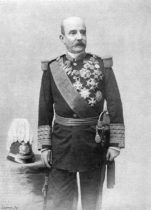 Retrato de Fernando Primo de Rivera y Sobremonte, de una fotografía de Fernando Debás, grabado de Laporta, recogido en la revista española La Ilustración Española y Americana.